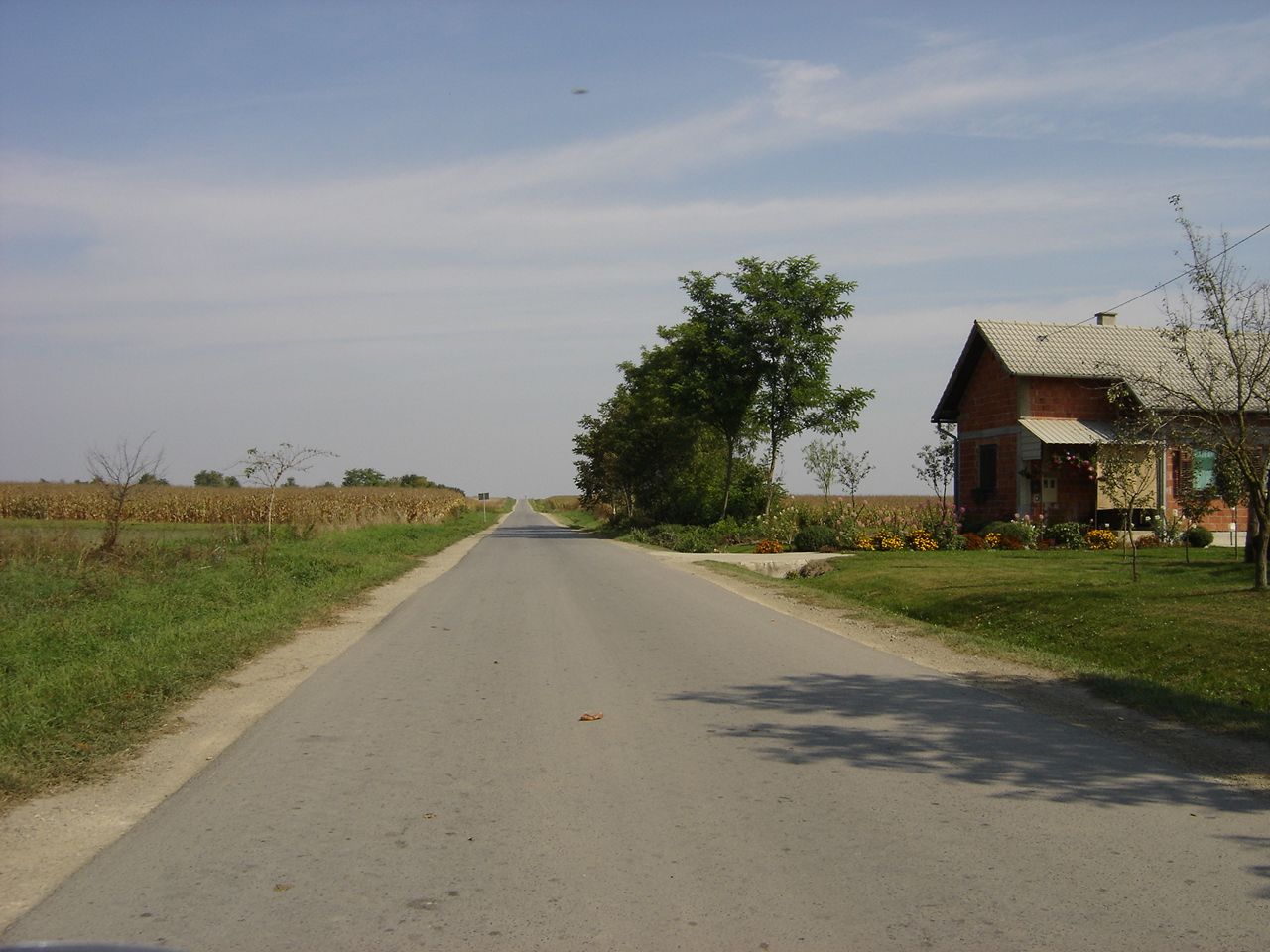 Lokalna cesta L44030 u Baranji (Majške Međe - državna cesta D517)